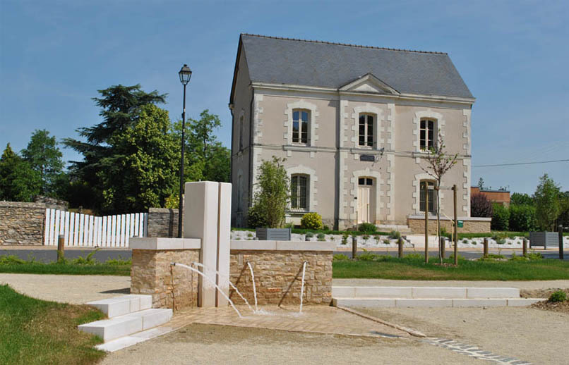 Bourg de Sarrigné (Maine-et-Loire, France).